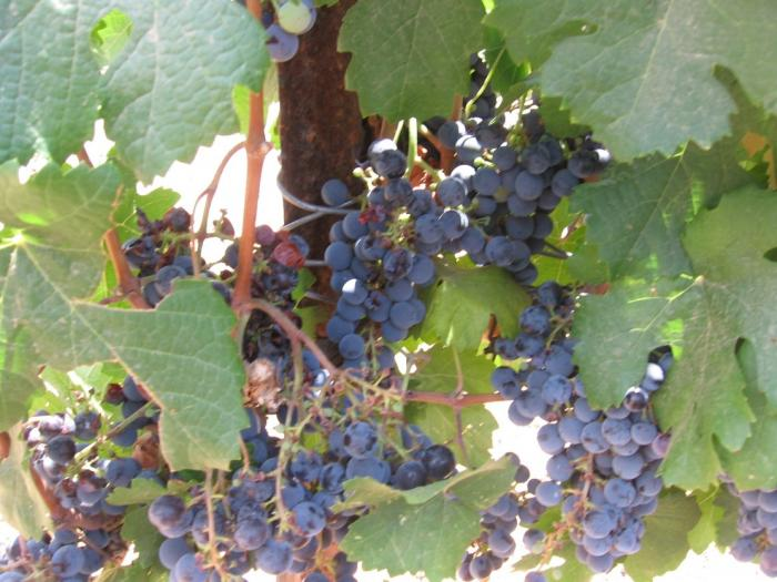 ענבים לפני הקטיף